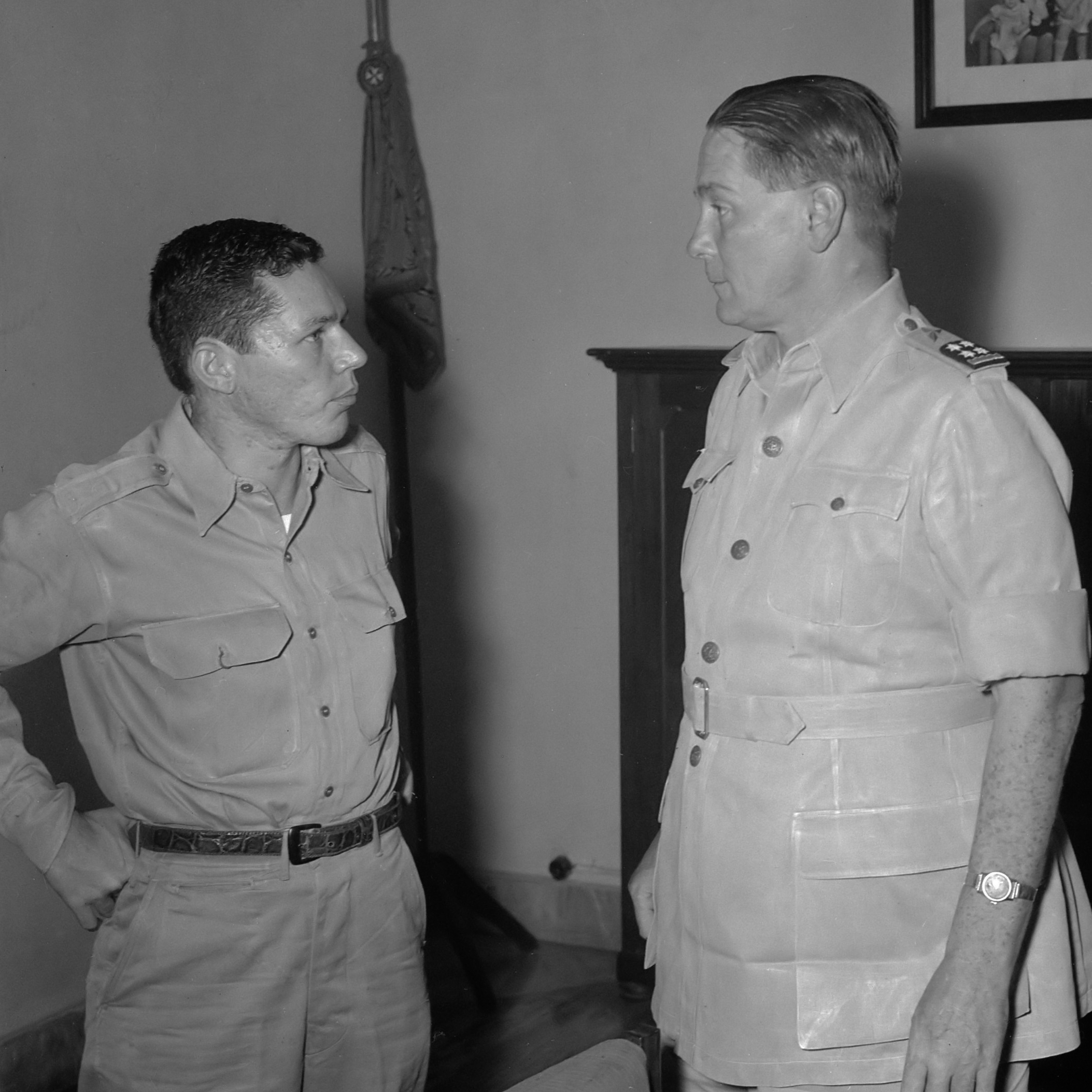 Journalist en correspondent voor United Press, A.C. Brackman (links), op audiëntie bij Generaal D.C. Buurman van Vreeden 1949/10/00